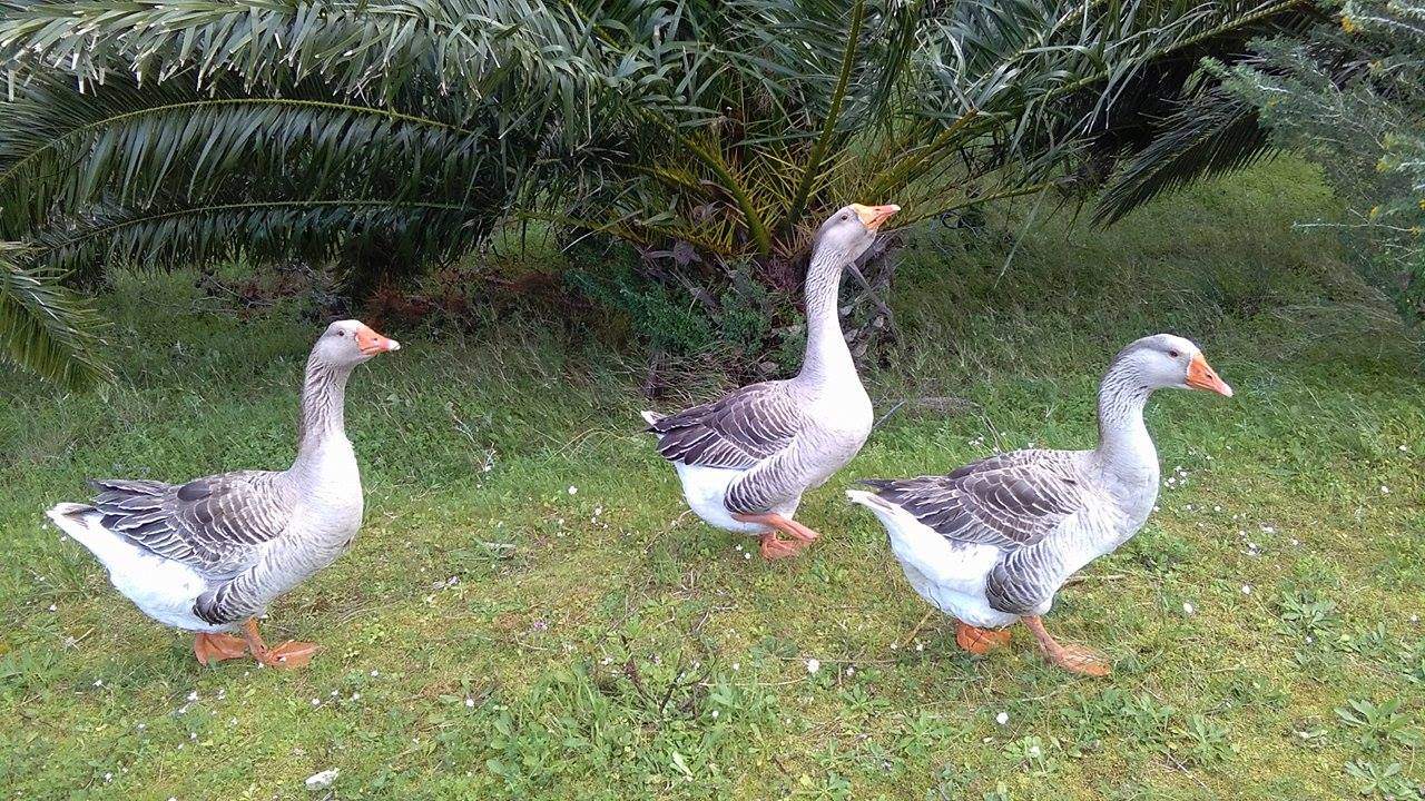 Σταχτόχηνες στην λιμνοθάλασσα του Κουτάβου This is a photography of Natura 2000 protected area with ID GR2220002